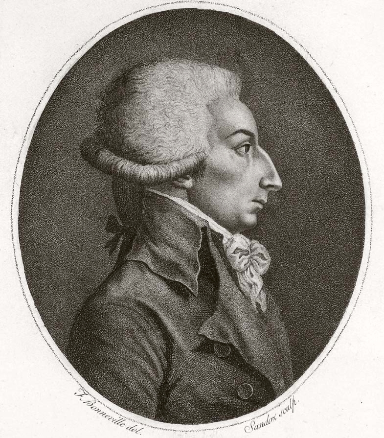 Portrait of Louis Michel le Peletier de Saint-Fargeau (1760-1793), French politician